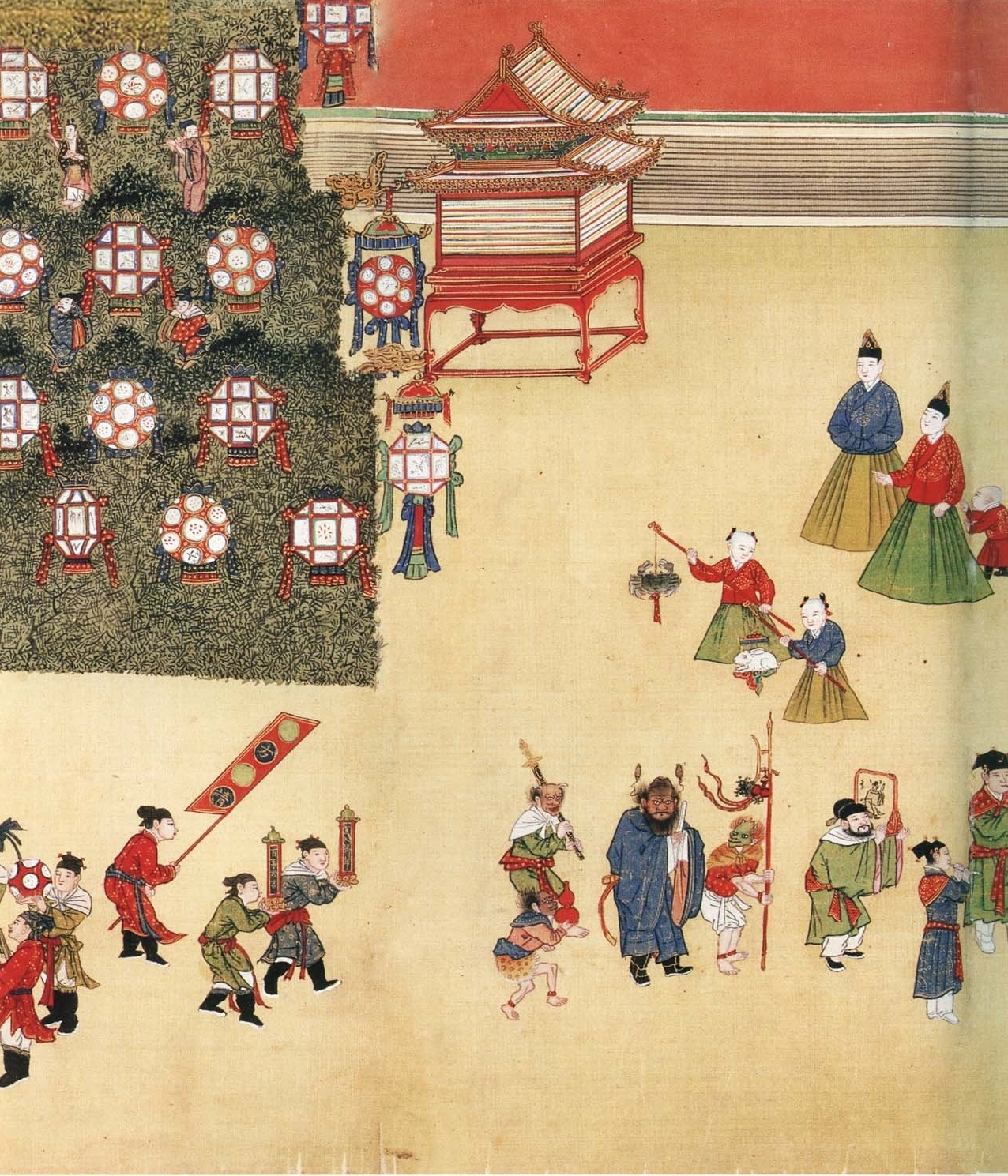 中文（香港）: 明憲宗元宵行樂圖